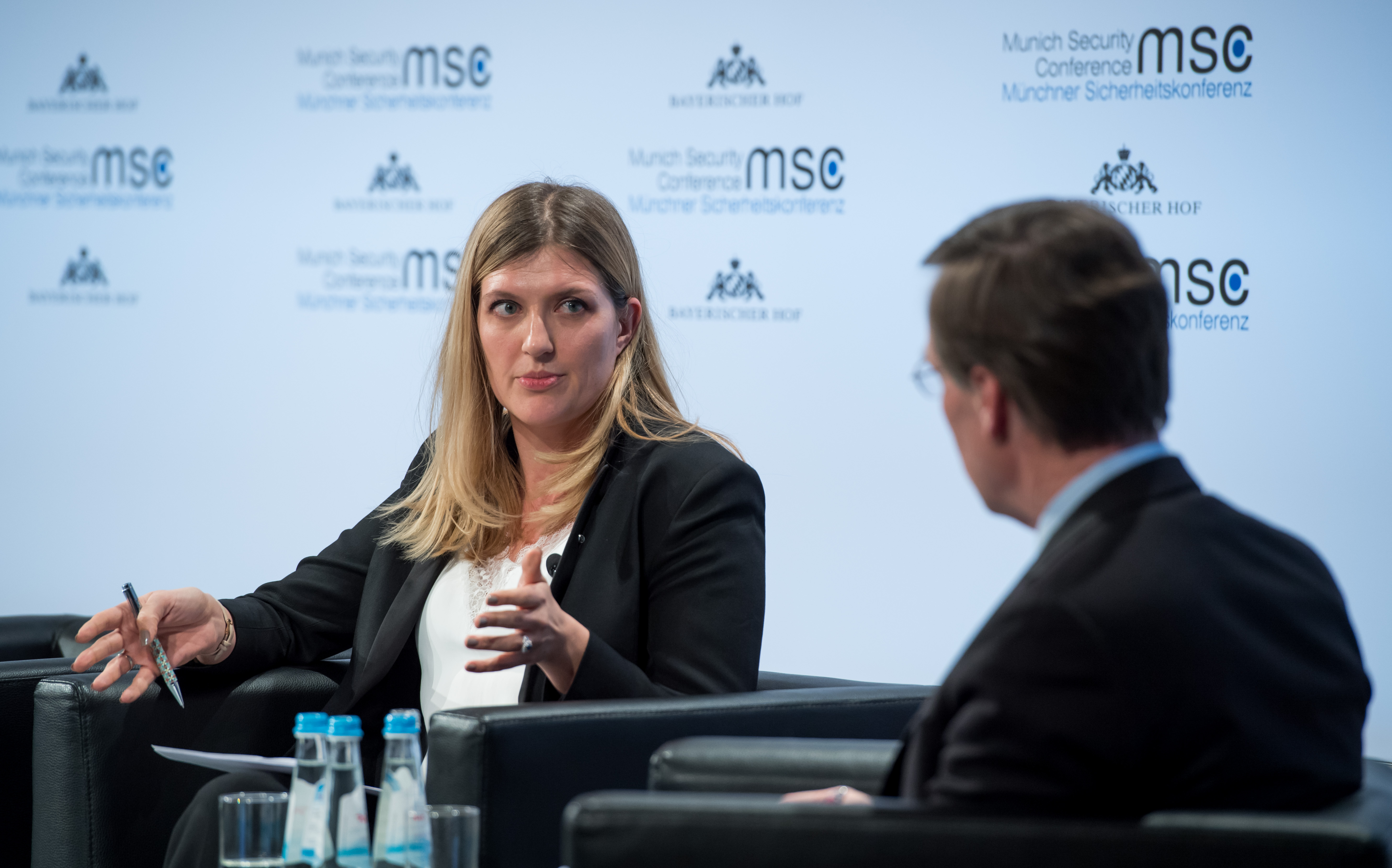 Beatrice Fihn während der Münchener Sicherheitskonferenz 2018